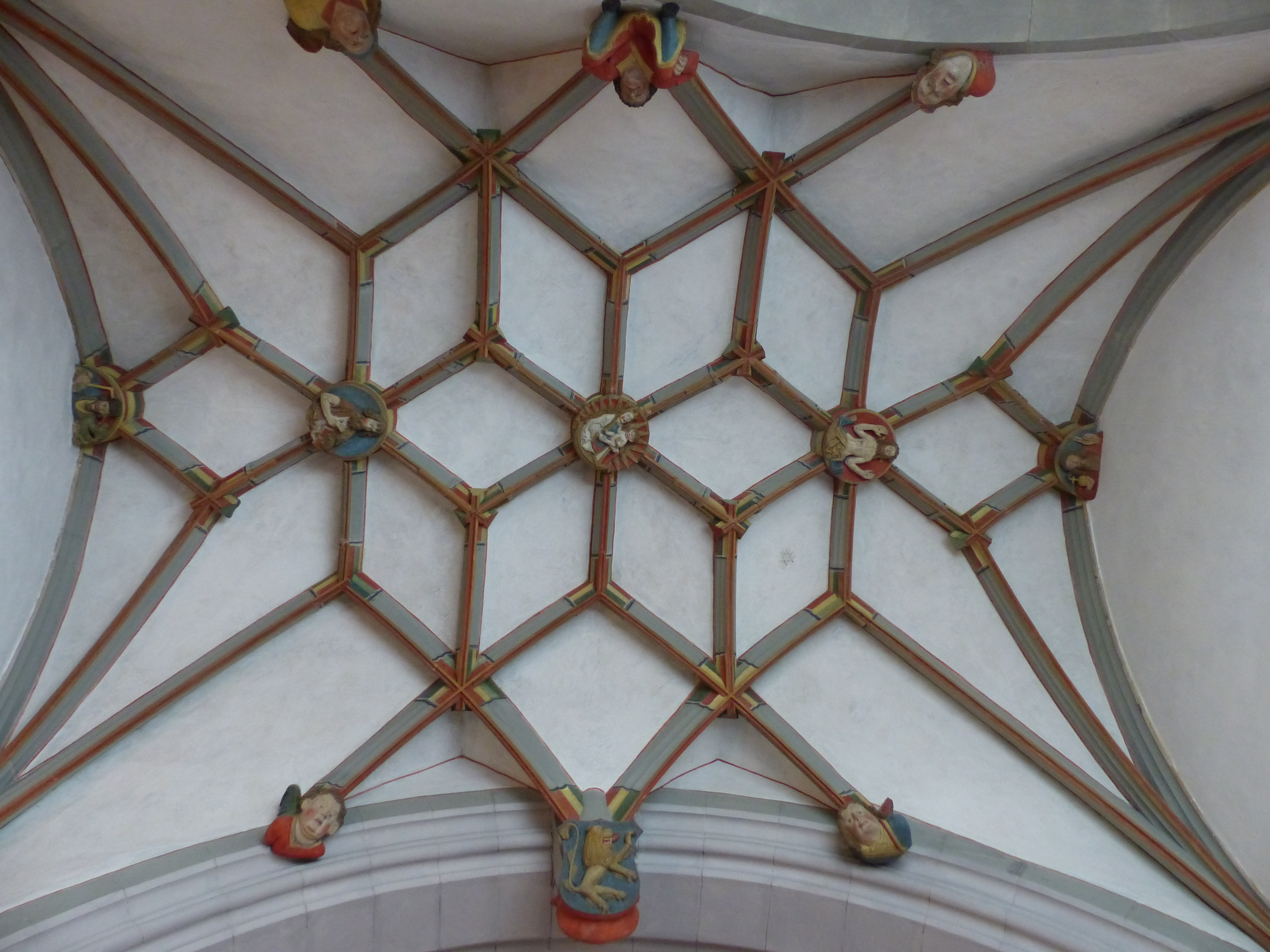 St Johann, Schaffhausen: Gewölbe der Löwenkapelle mit Schlusssteinen: u.a. Löwe (als Stifterwappen), Engelsköpfe, Gottvater, Johannes der Täufer und die Madonna mit Kind.